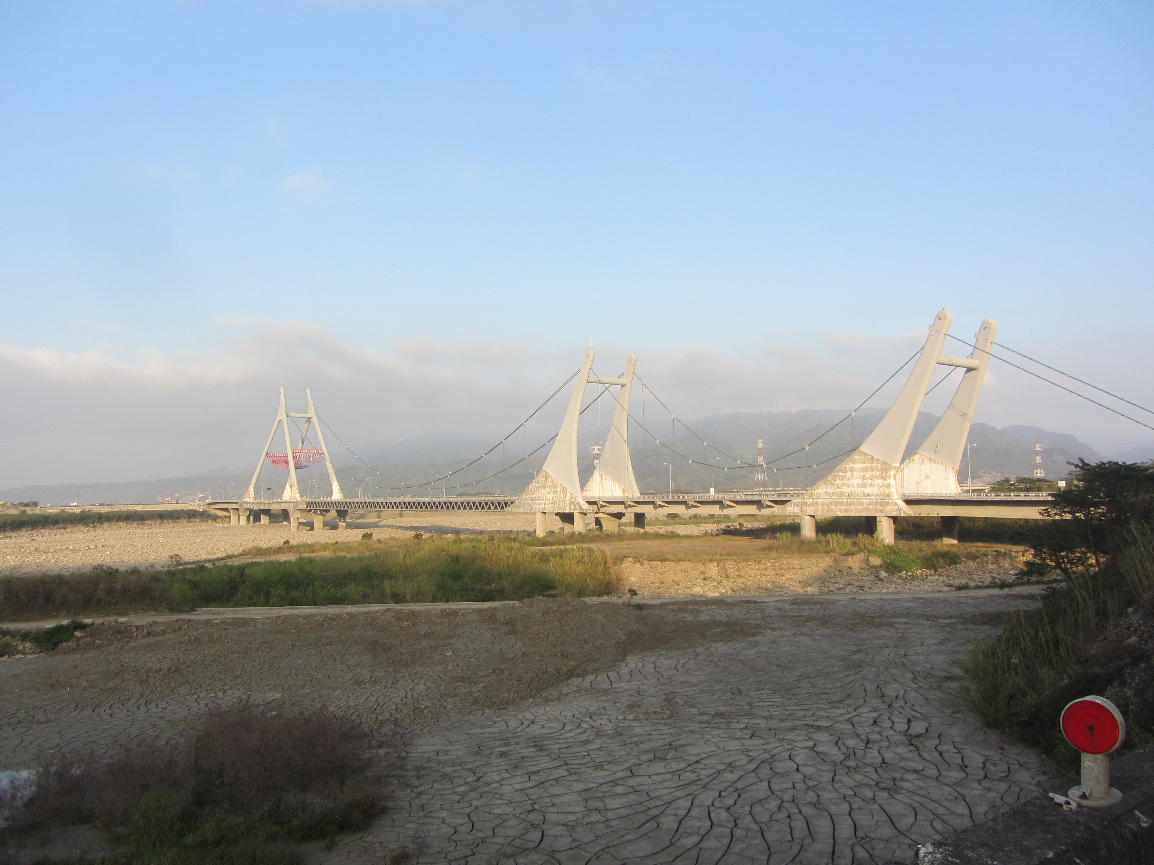 銜接苗栗縣銅鑼鄉與公館鄉的客屬大橋